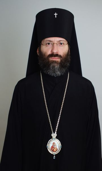 Son Éminence l'Archevêque Job de Telmessos, Exarque du Patriarche Oecuménique